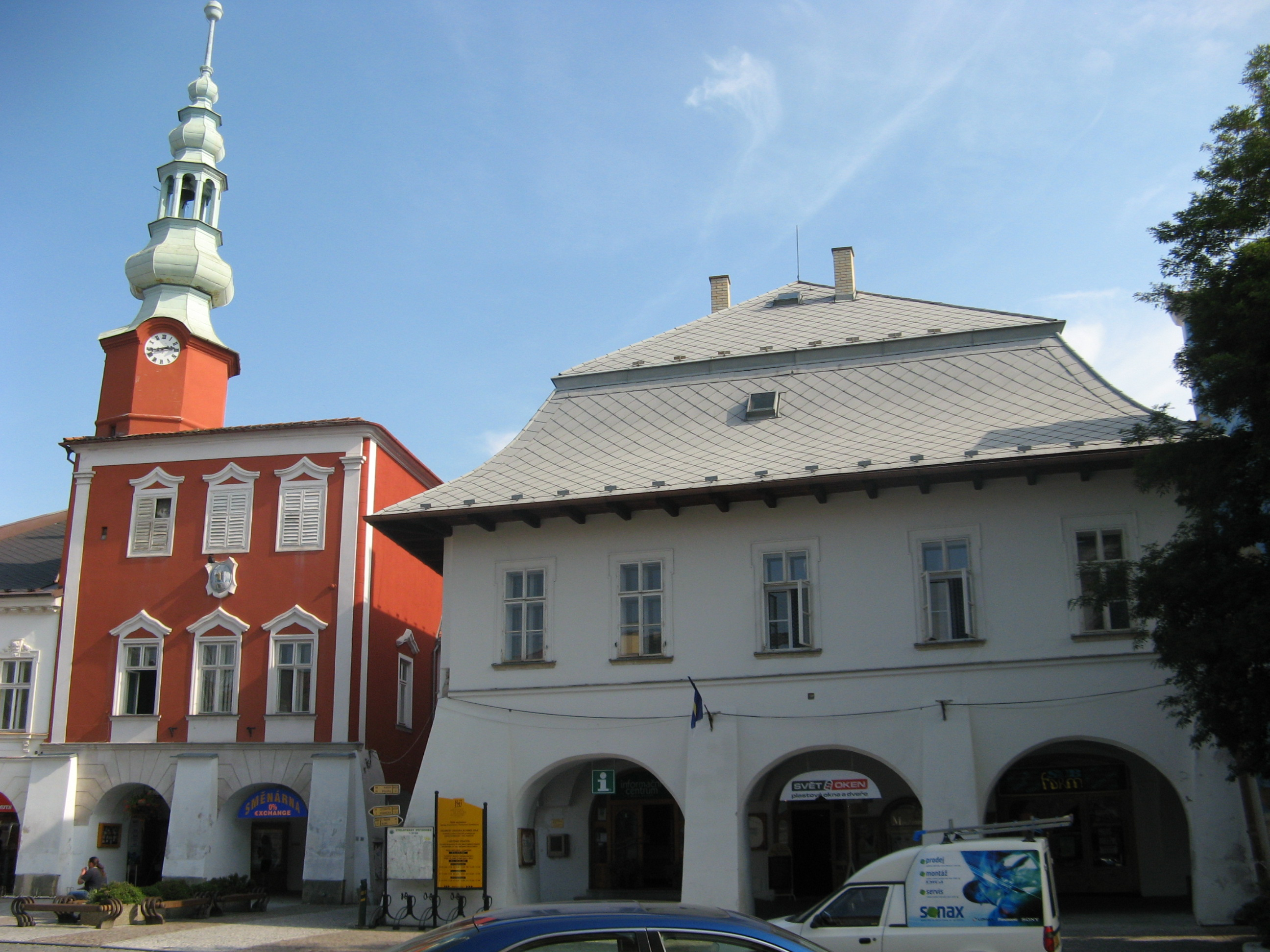 Dům U mouřenína (bílý dům) a Stará radnice (dům s věží) na Náměstí míru ve Svitavách